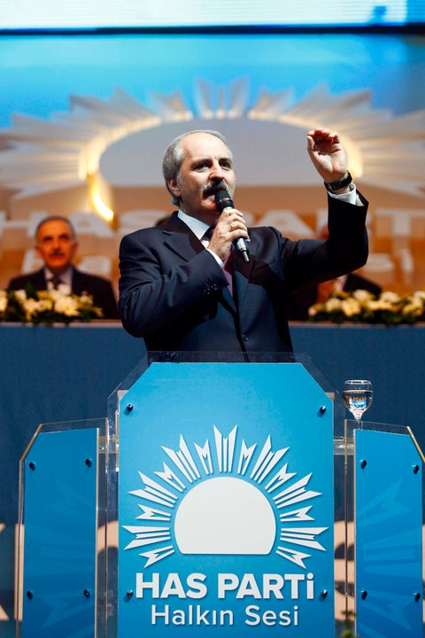 Halkın Sesi Partisi 1. Olağan Kongresi.